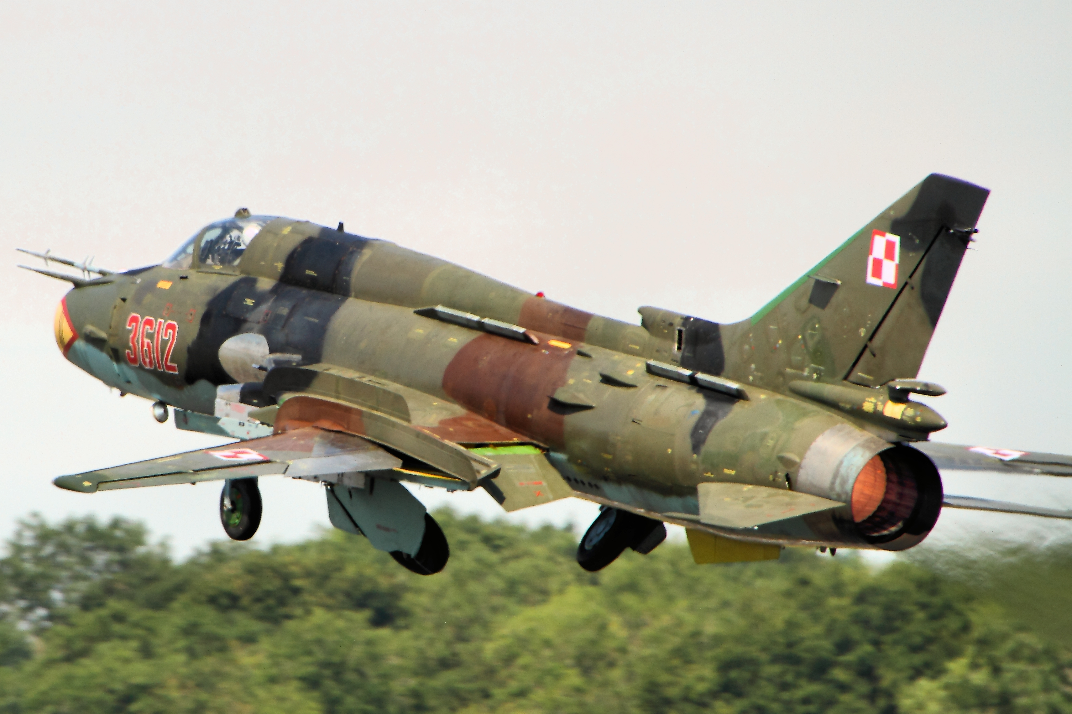 SU-22 Fitter - RIAT 2014